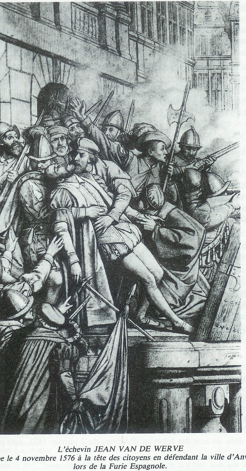 papier op doek 133 x 68. Antwerpen, Museum voor Schone Kunsten